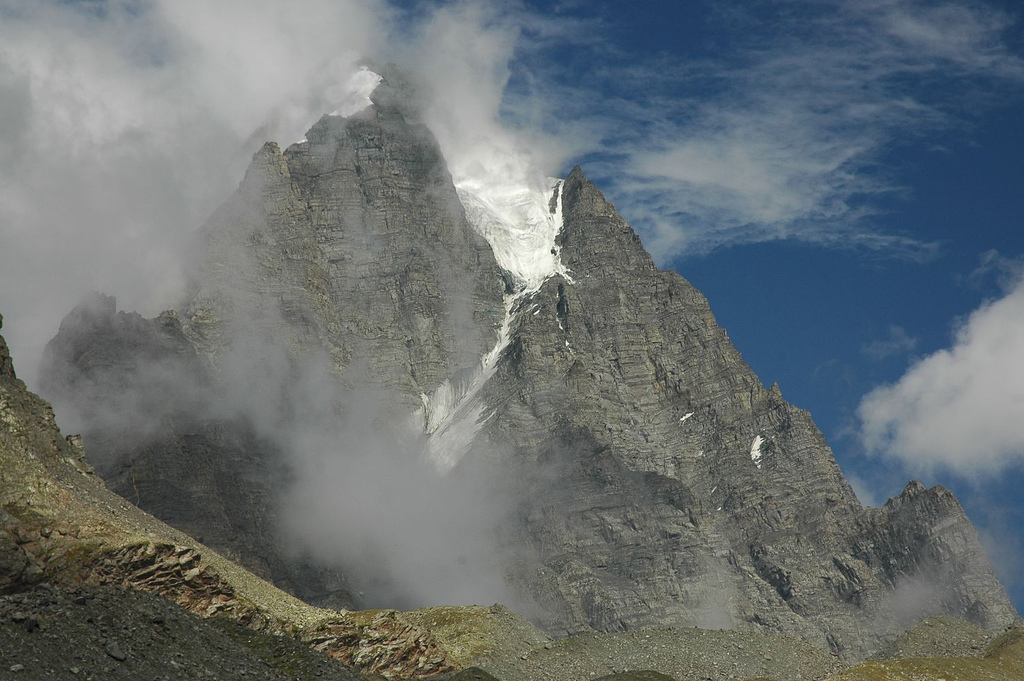 "Manimahesh Kailash peak"